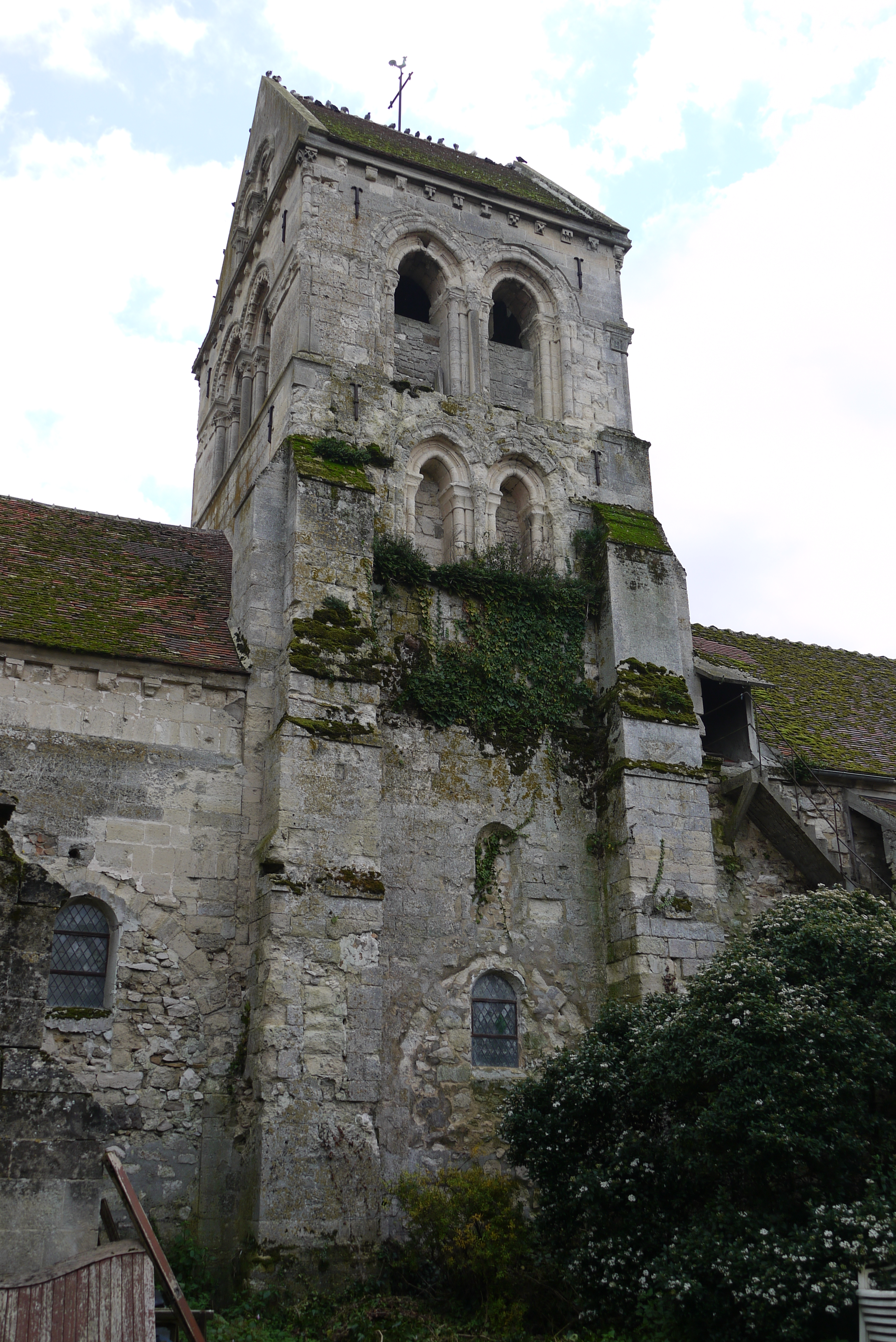 Église Sainte-Geneviève de Marizy-Sainte-Geneviève